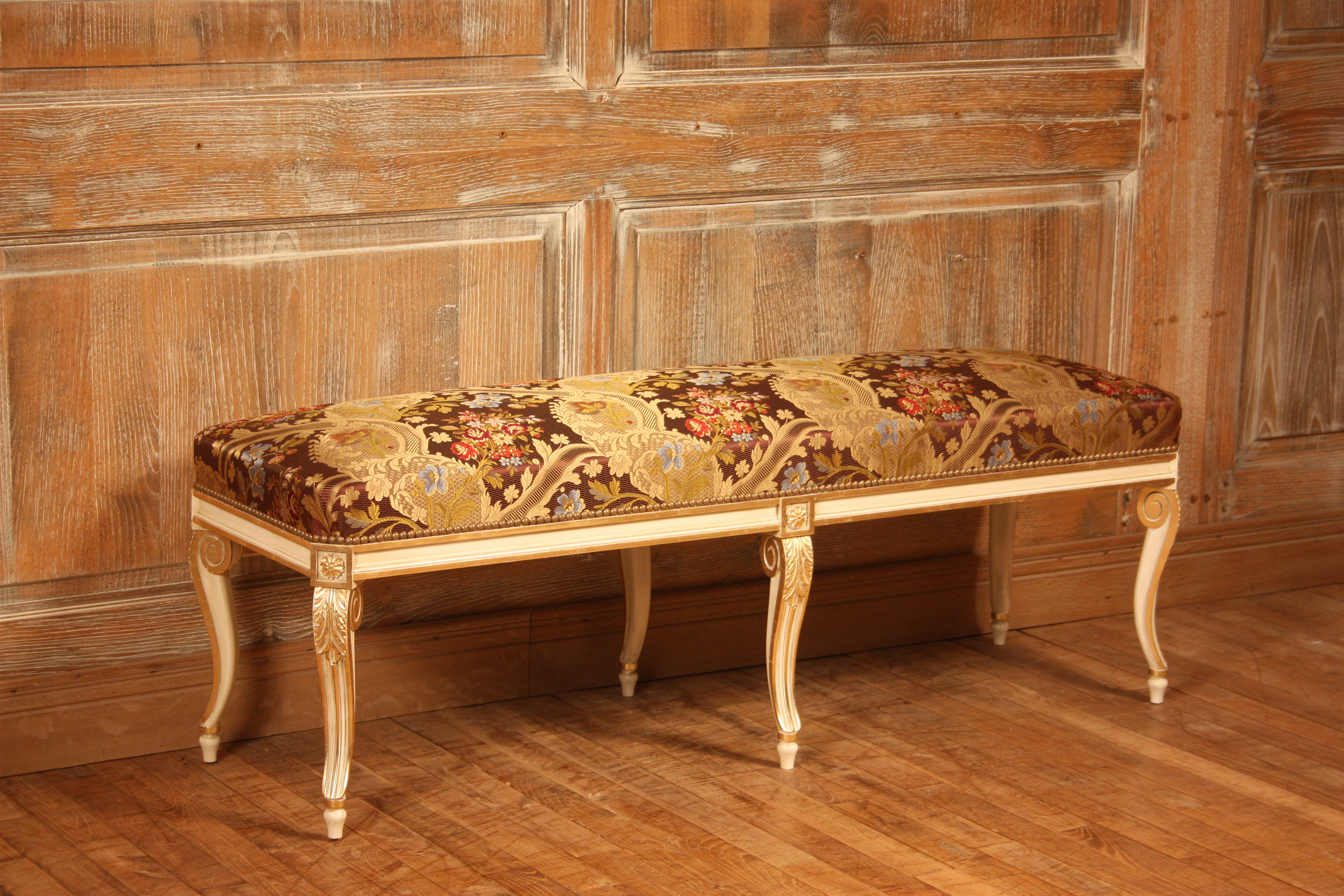 Banquette à 6 pieds "Georges - Jacob" de style Transition réplique d'un modèle d'époque réalisé par les Ateliers Allot Frères.